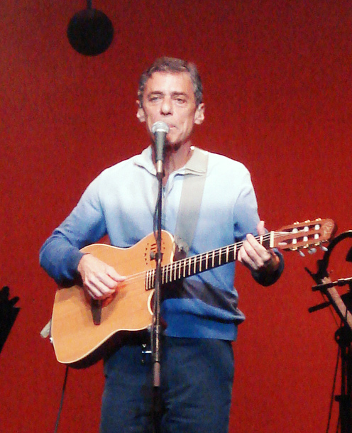 O cantor e compositor brasileiro Chico Buarque.